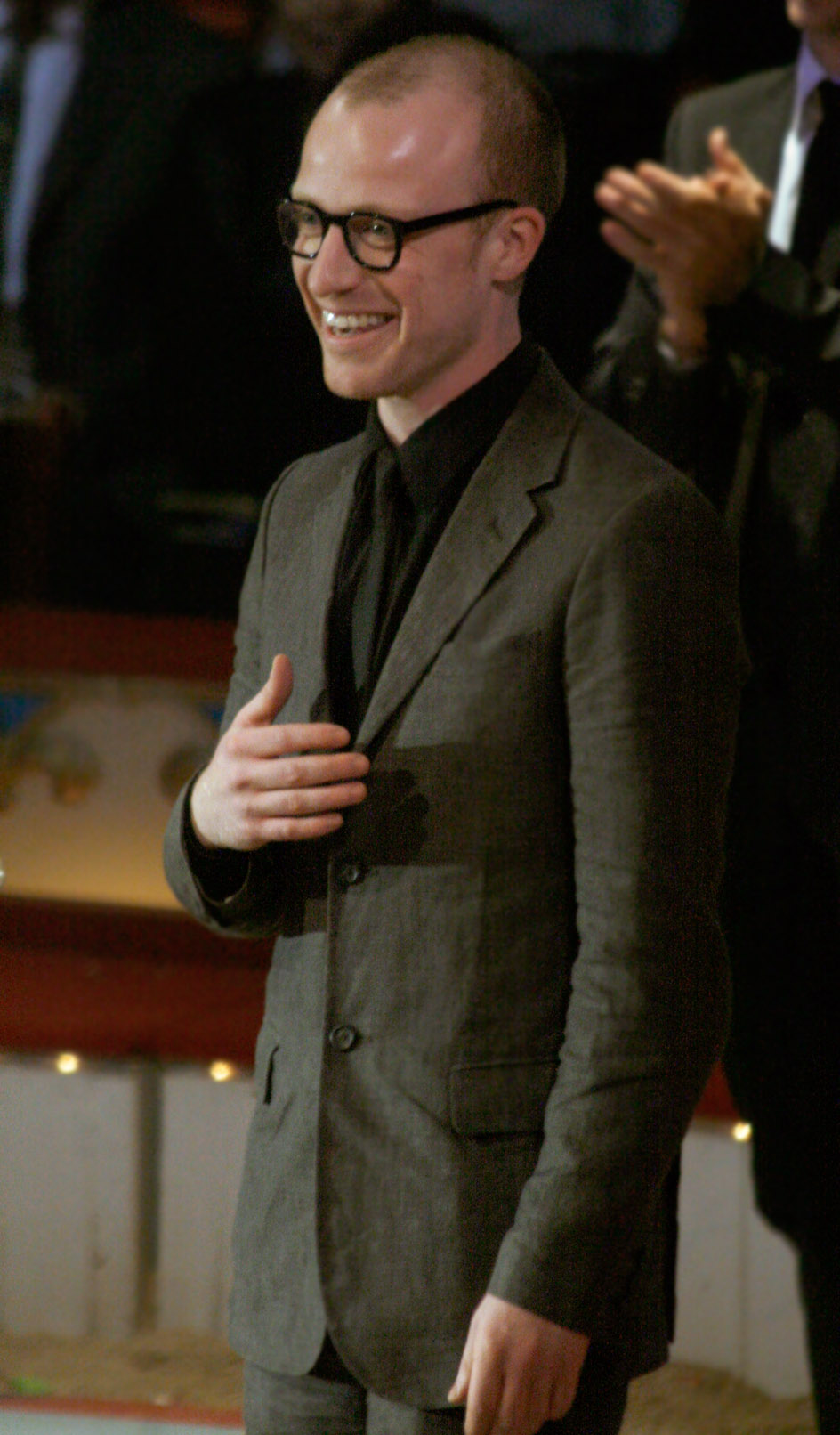 Gerrit Jansen, ausgezeichnet in der Kategorie Bester Nachwuchs, während der Verleihung des Nestroy-Theaterpreises 2009 (Circus Roncalli auf dem Wiener Rathausplatz).